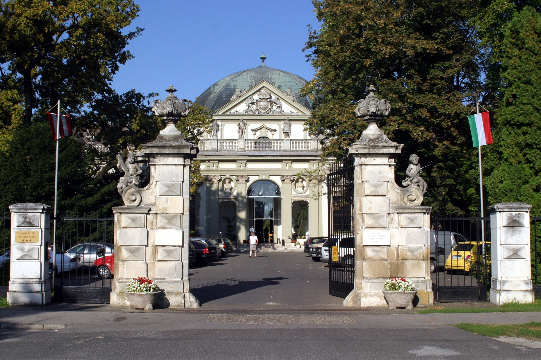 Blick durch das Haupttor auf die große Halle von Schloss Ráckeve